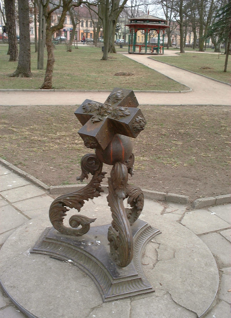 Poland, Suwalki - sundial